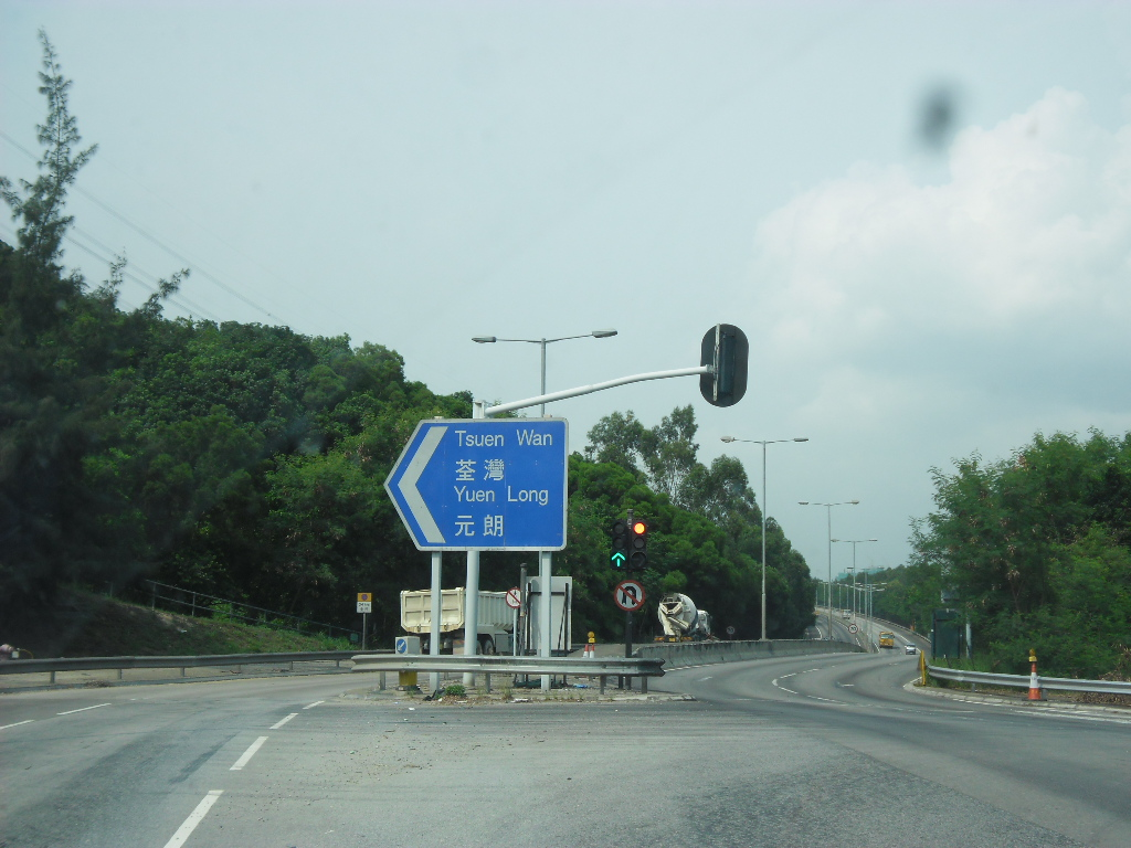 屯門龍富路近連接龍門路的迴旋處